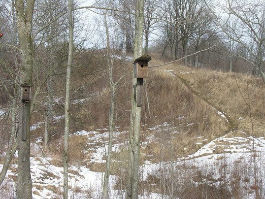 Jautakių piliakalnis iš pietryčių pusės, Mažeikių rajonas Foto: Algirdas, 2006 m. kovo 21 d.